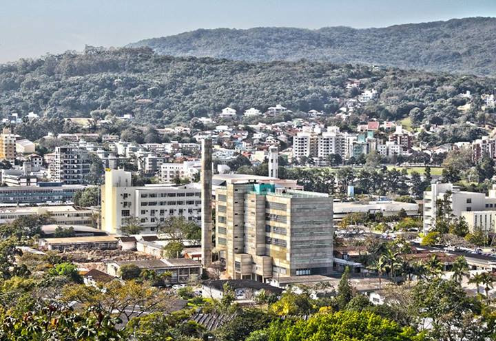 500px provided description: HDR- UFSC.